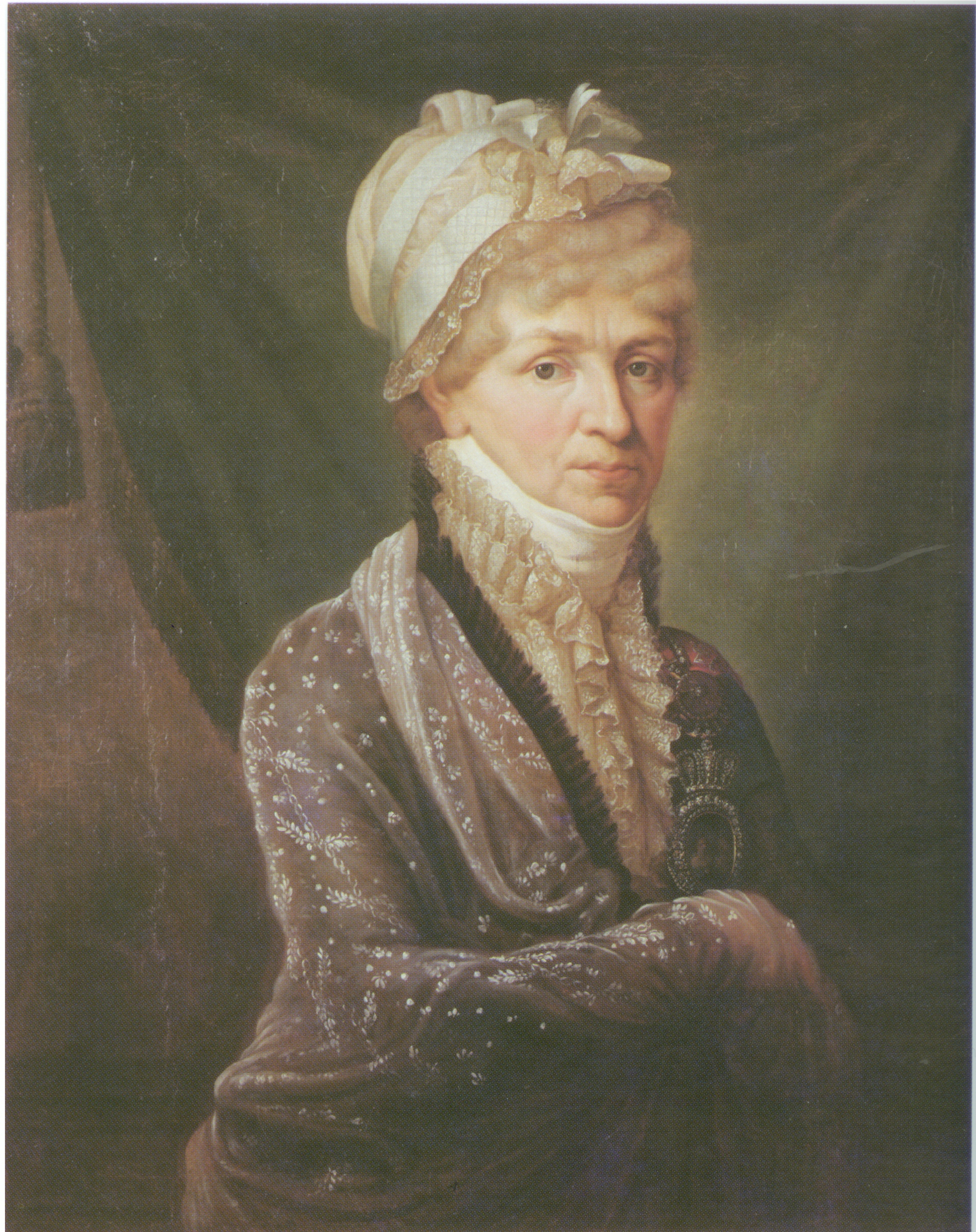 Наталья Петровна Голицына, ур.Чернышова